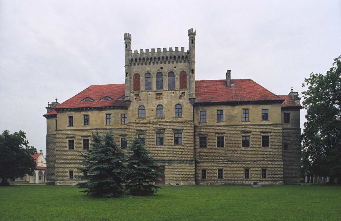 KsiazWielki castle